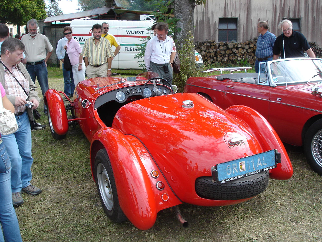 Heck eines Healey Silverstone